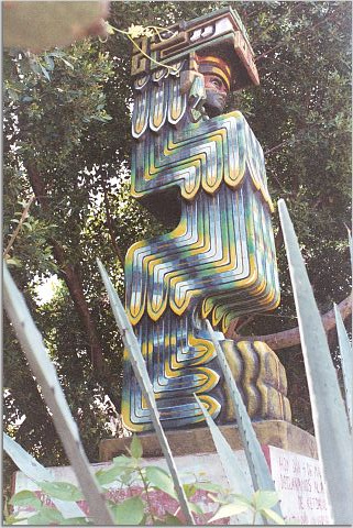 Nāhuatl: se akatl topiltzin otlakat ipan se akatl xiuitl, metztli ueutosostli tonali matlaktli uan yei akatl 4-V-843 d.C.